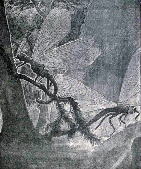 Titanophasma fayoli and Protophasma dumasii.